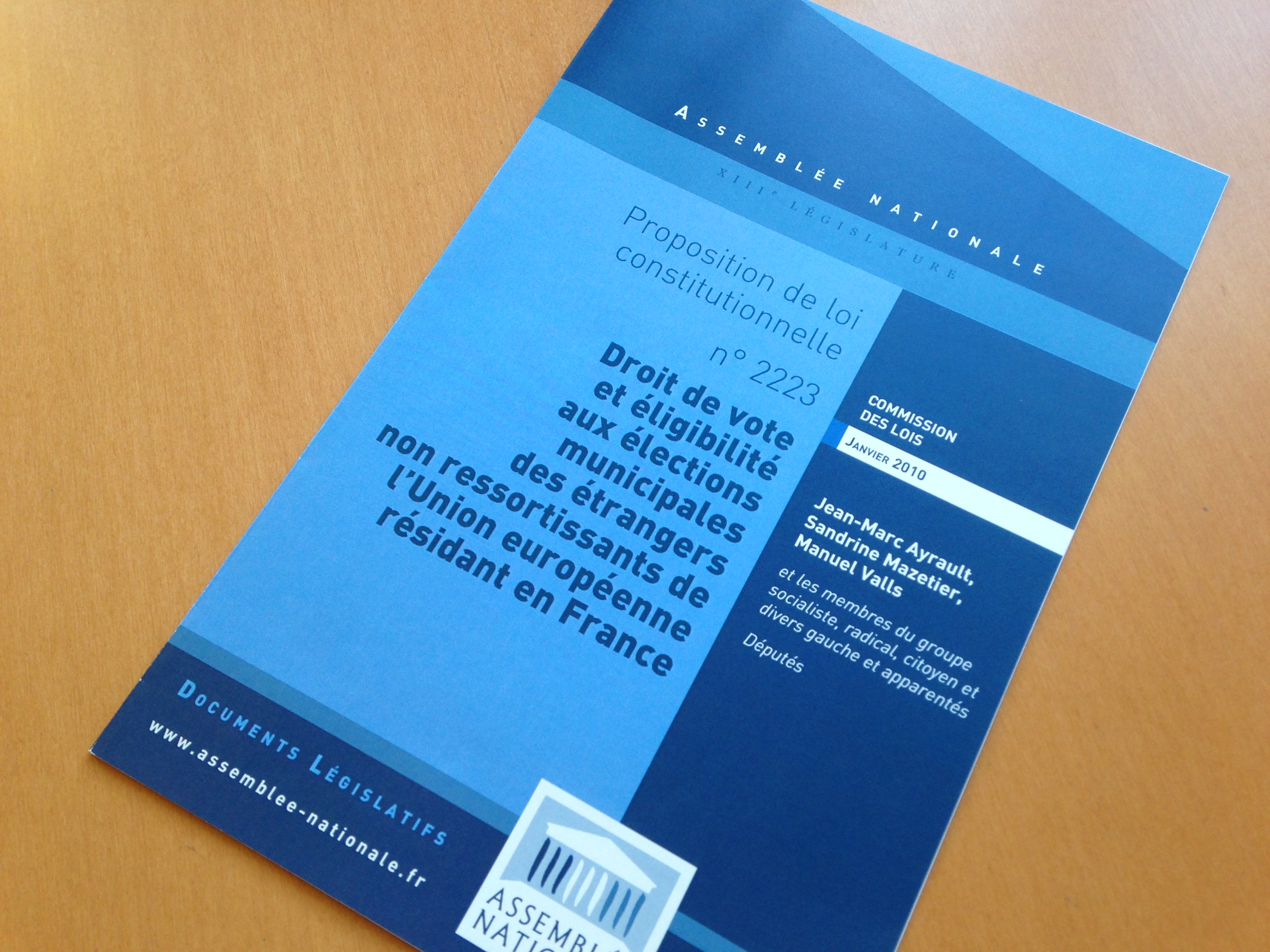 Couverture de la proposition de loi 2223 (janvier 2010) à l'Assemblée nationale française déposée par Sandrine Mazetier, Jean-Marc Ayrault, Manuel Valls et les députés socialistes